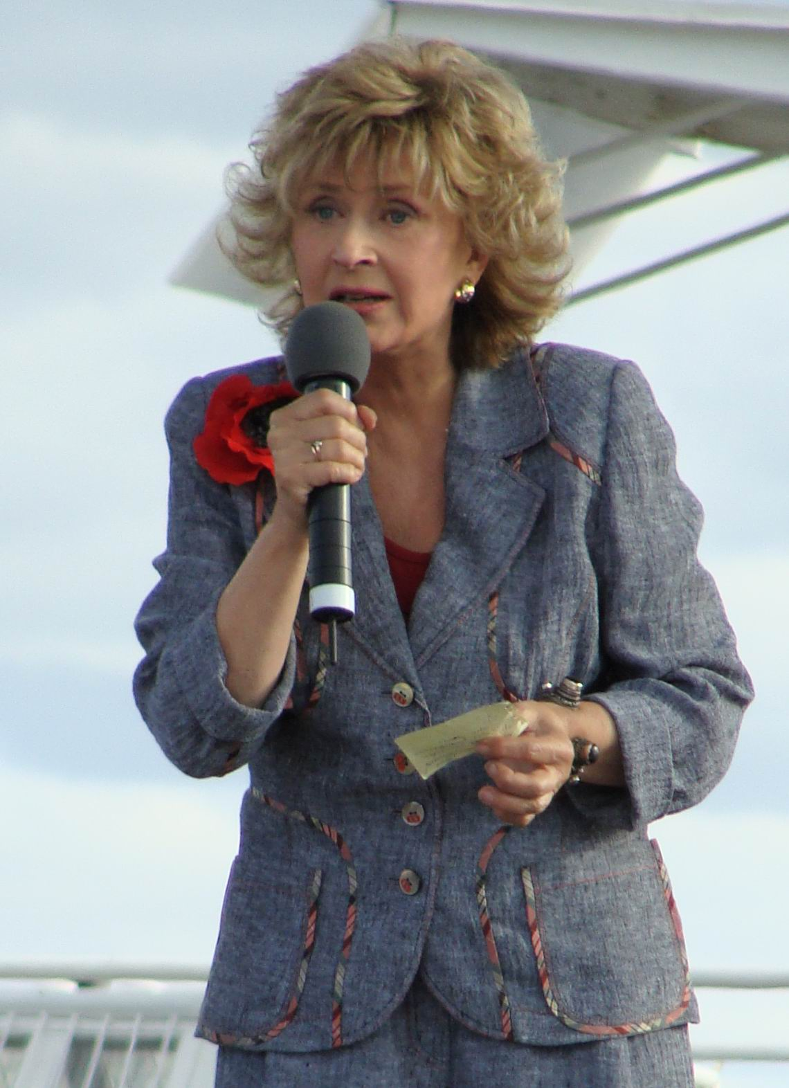 Дубовицкая Регина на записи передачи "Аншлаг в Архангельске"